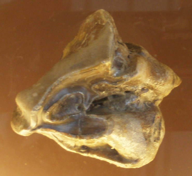 Fossil of Hispanotherium, an extinct rhinoceros Took the photo at Musee d'Histoire Naturelle, Brussels